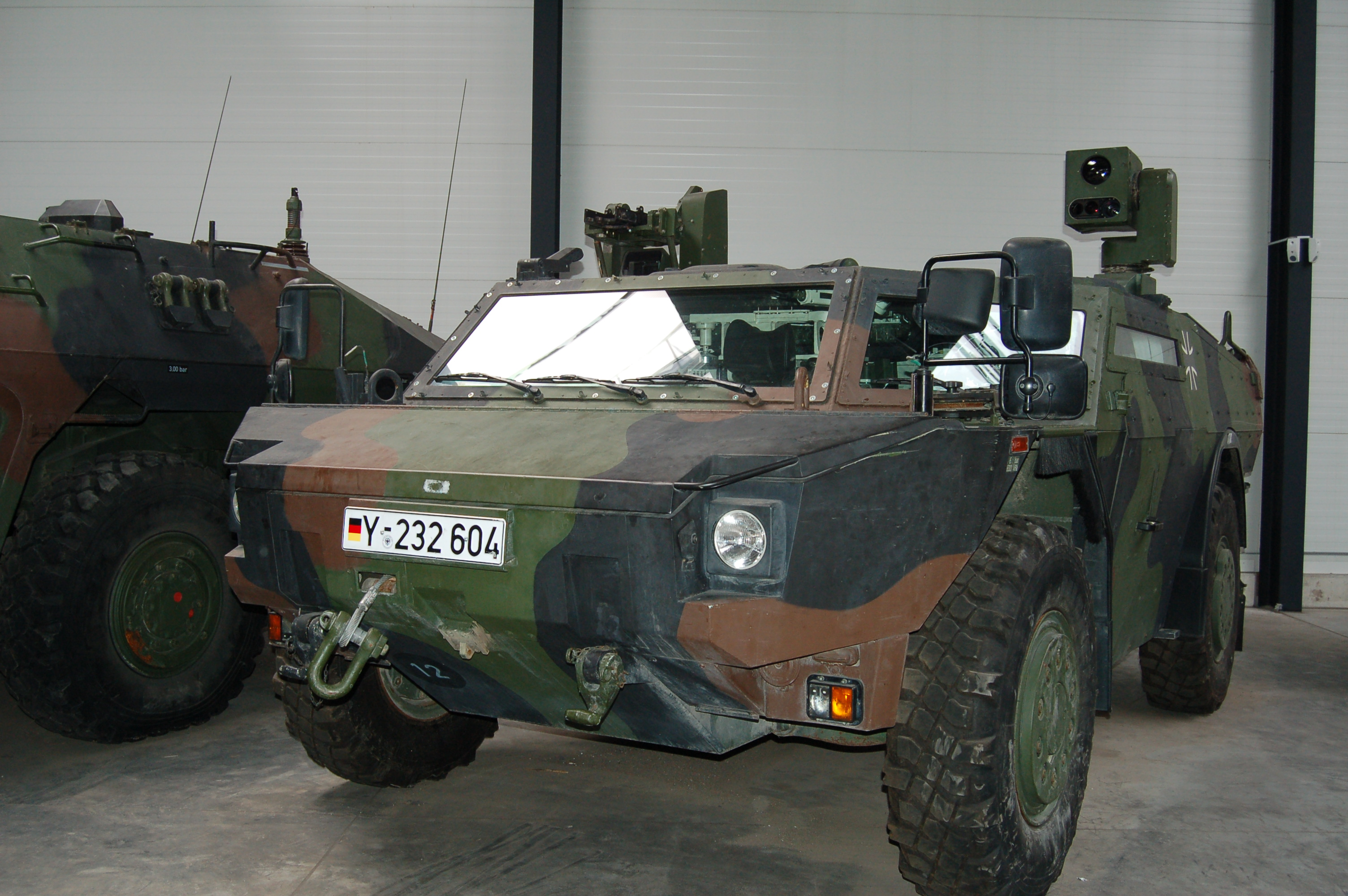 Spähwagen "Fennek" (4 x 4) Besatzung: 3 Soldaten Gewicht: 11,0 Tonnen Motorleistung: 177 kW (240 PS) Bewaffnung: 1 Granatmaschinenwaffe 40 mm auf Lafette mit Zielperiskop, sowie 1 MG 7,62 mm Besonderheiten: Navi mit GMS-Stützung, Laserentfernungsmeser und Wärmebildgerät Baujahr: ab 2003 Stückzahl: 200